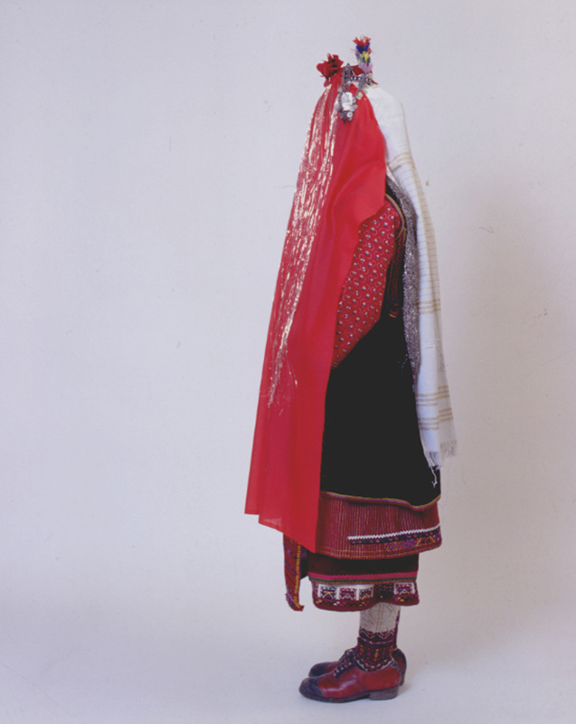 Νύφη από την Άνω Ορεινή Σερρών, καλυμμένη με την "τσίπα" (κόκκινο μαντίλι) και τα "τέλια" (χρυσές κλωστές). Συλλογή Πελοποννησιακού Λαογραφικού Ιδρύματος, Ναύπλιο